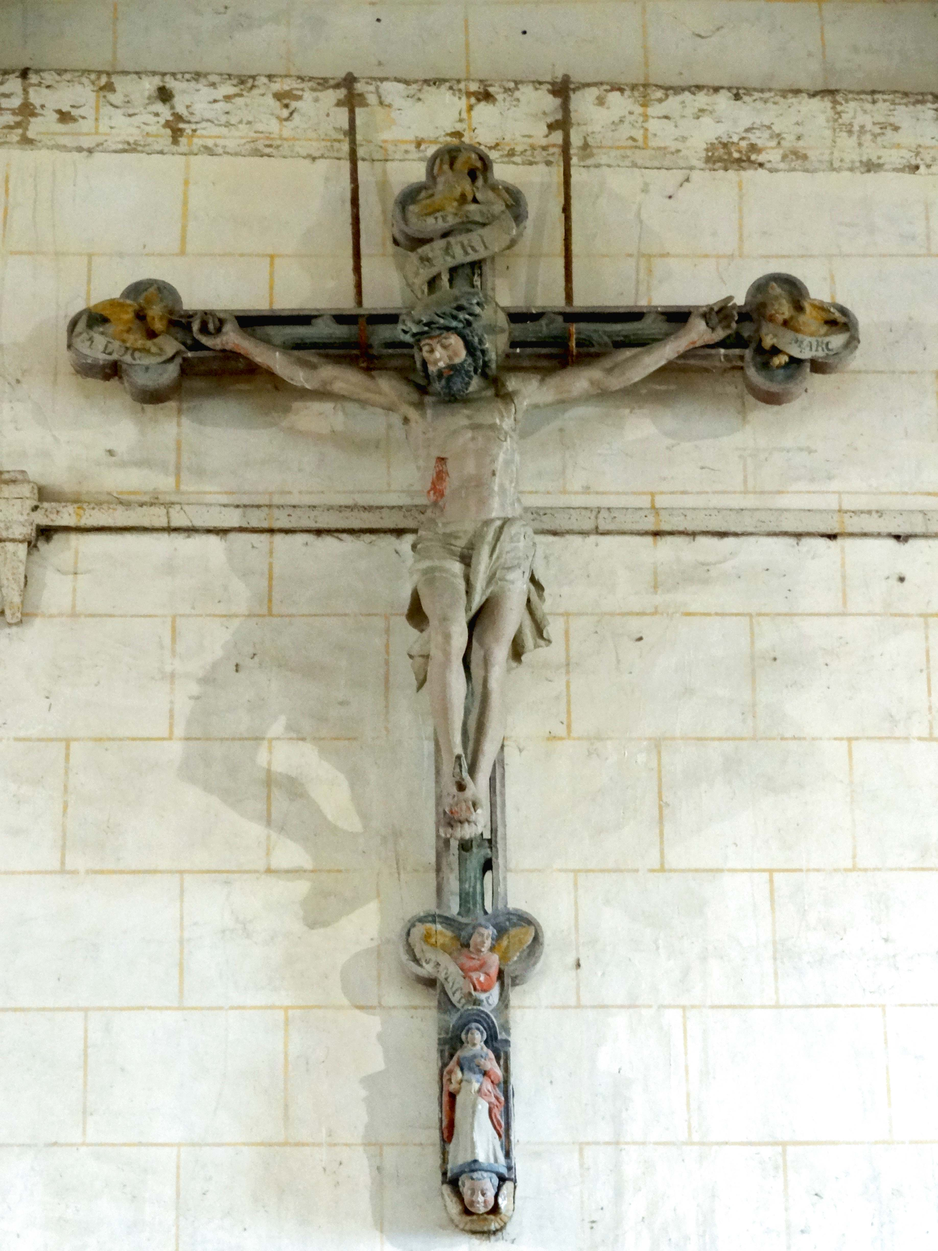 Mobilier de l'église - voir titre.